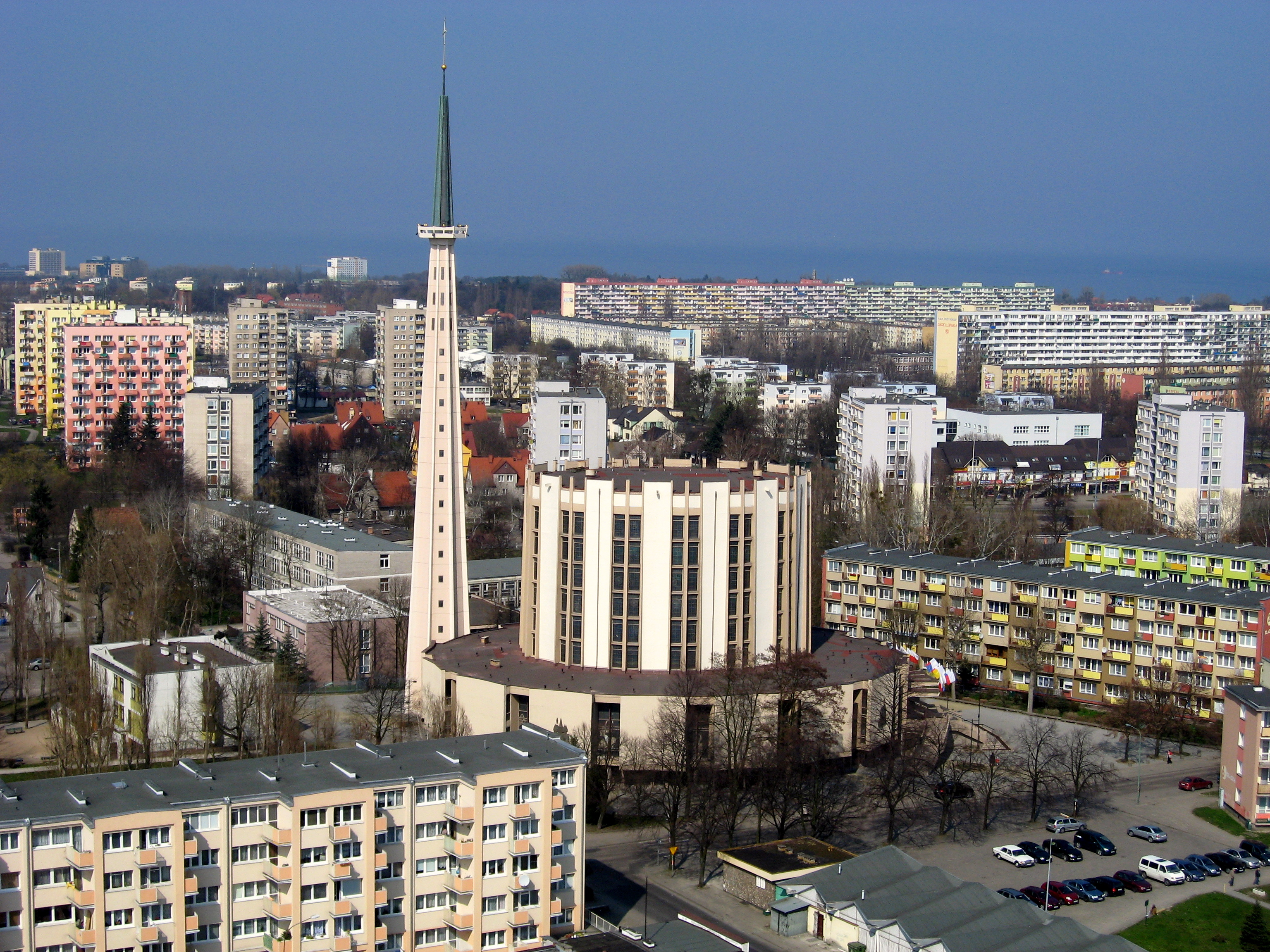 Kaszëbsczi: Parafiô p.w. Nôswiãtszi Mariji Panienczi Królewi Różańca Swiãtégò w Gduńsku